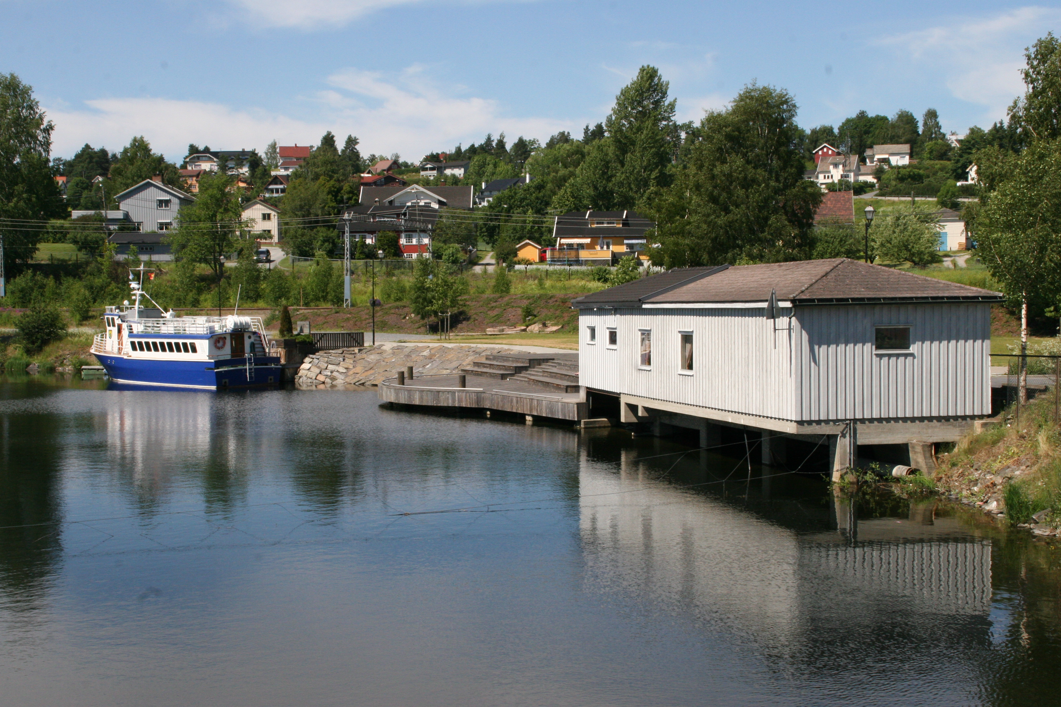 Vestfosselva river in Vestfossen, Norway